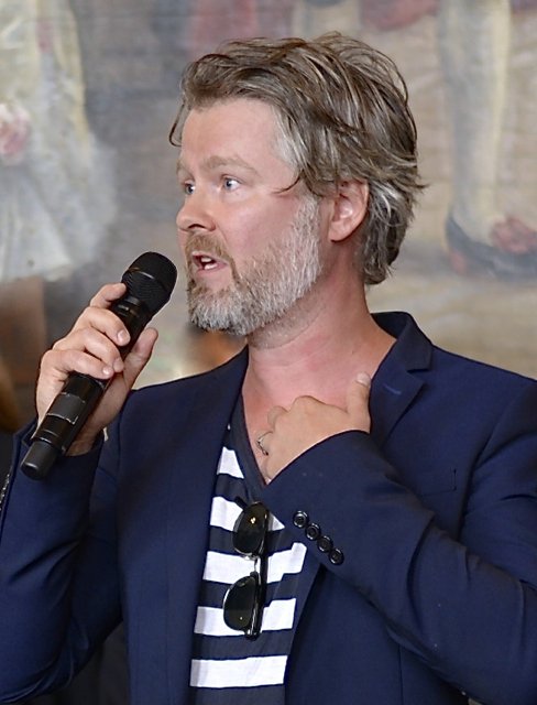 Jens Ohlin under Dramatens höstsamling den 19 augusti 2014.